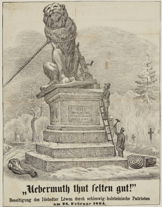 Holzstich, Flugblatt: Sturz des Idstedter Löwen durch schleswig-holsteinische Patrioten, 28. Februar 1864